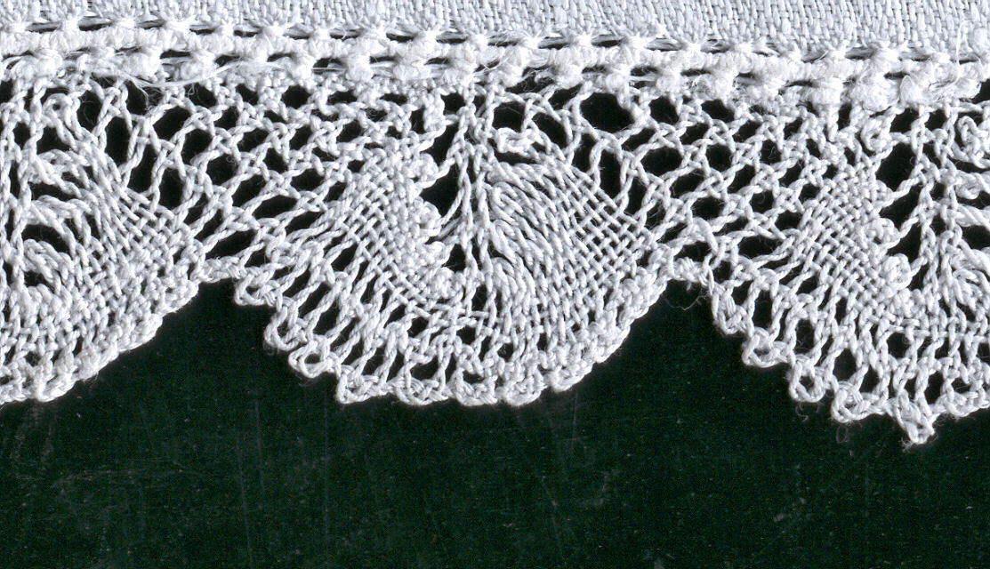 private collection